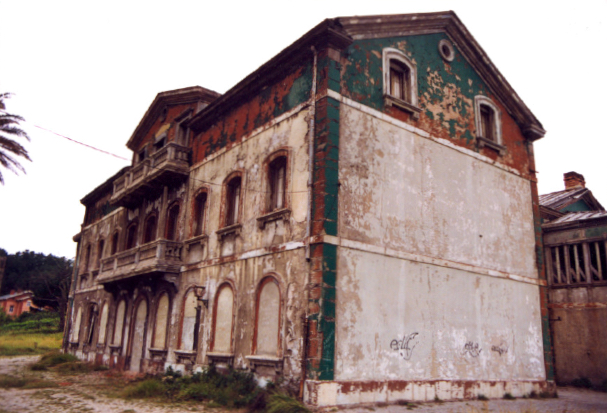 La Casona en Arnao, Castrillón, España